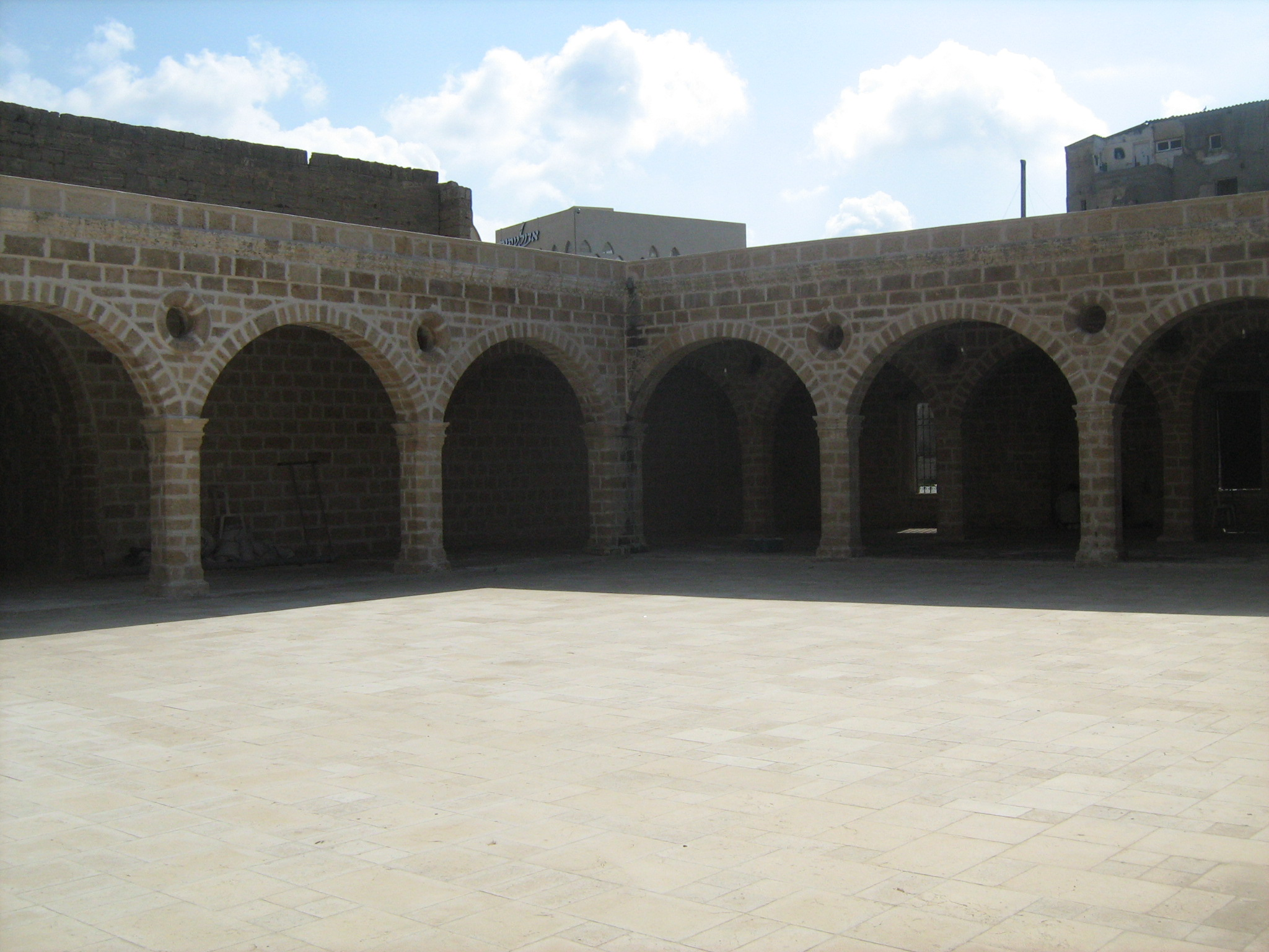 מסגד מחמודיה ביפו